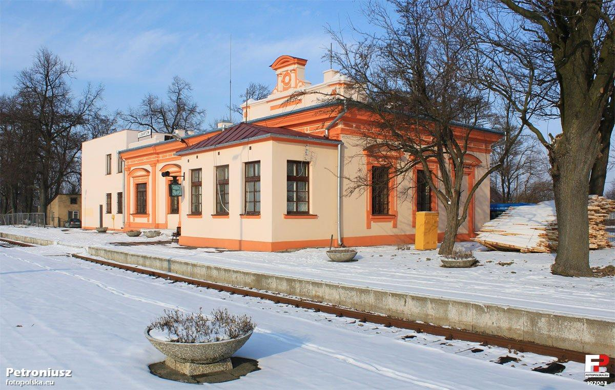 Stacja kolejowa i kolorowy, wyremontowany dworzec w Lubartowie.